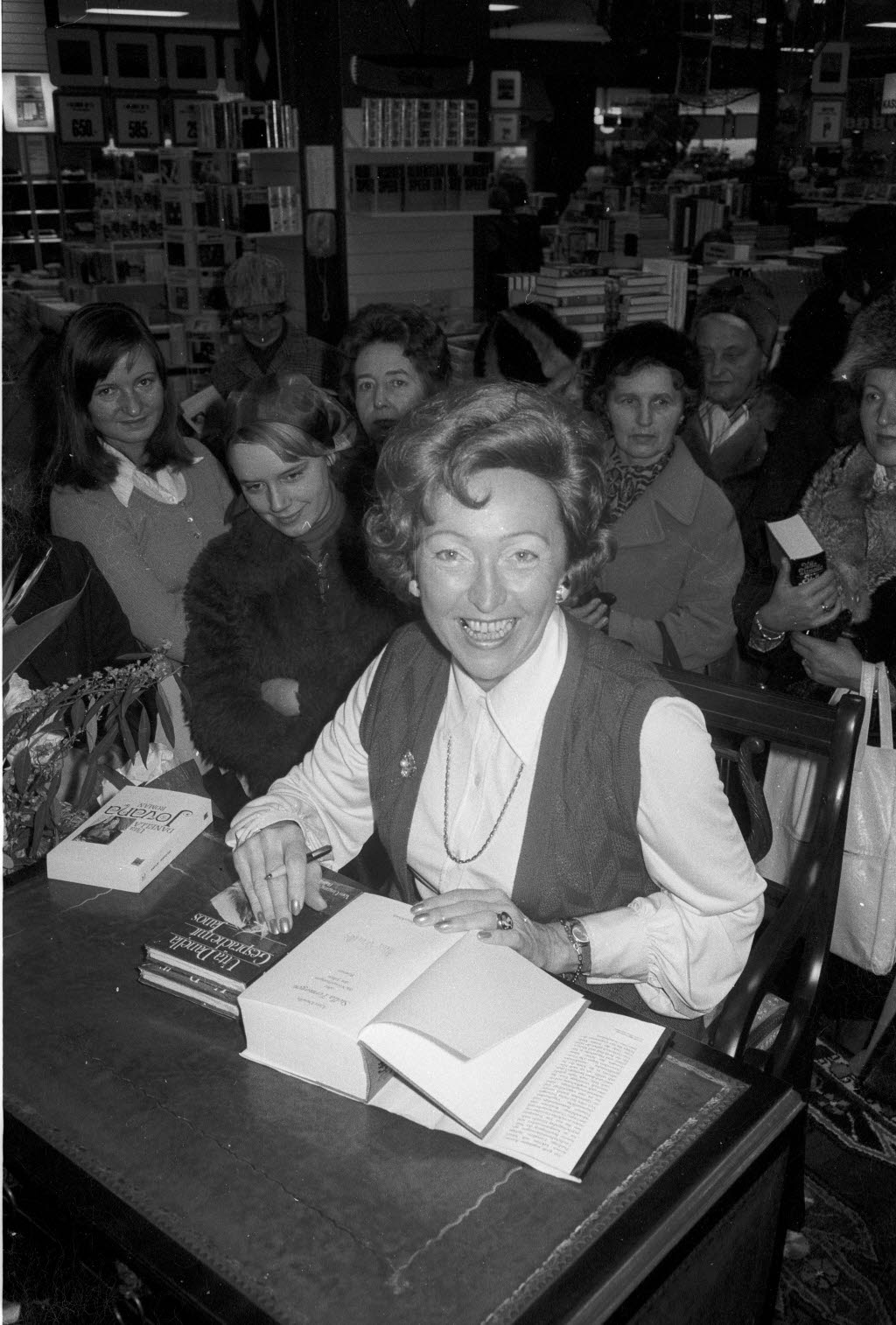 in der Buchabteilung des Kaufhauses Hertie.